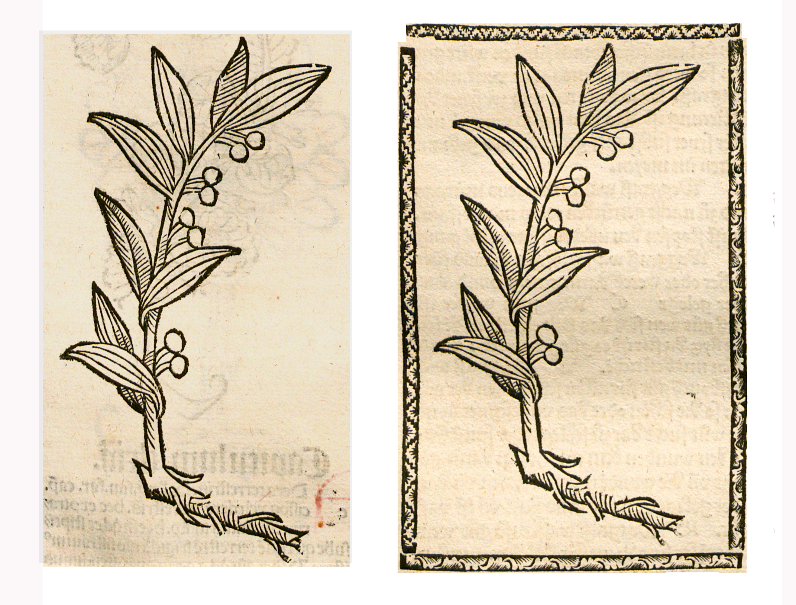 Abbildung von: Wyß Wurtz (Polygonatum multiflorum)